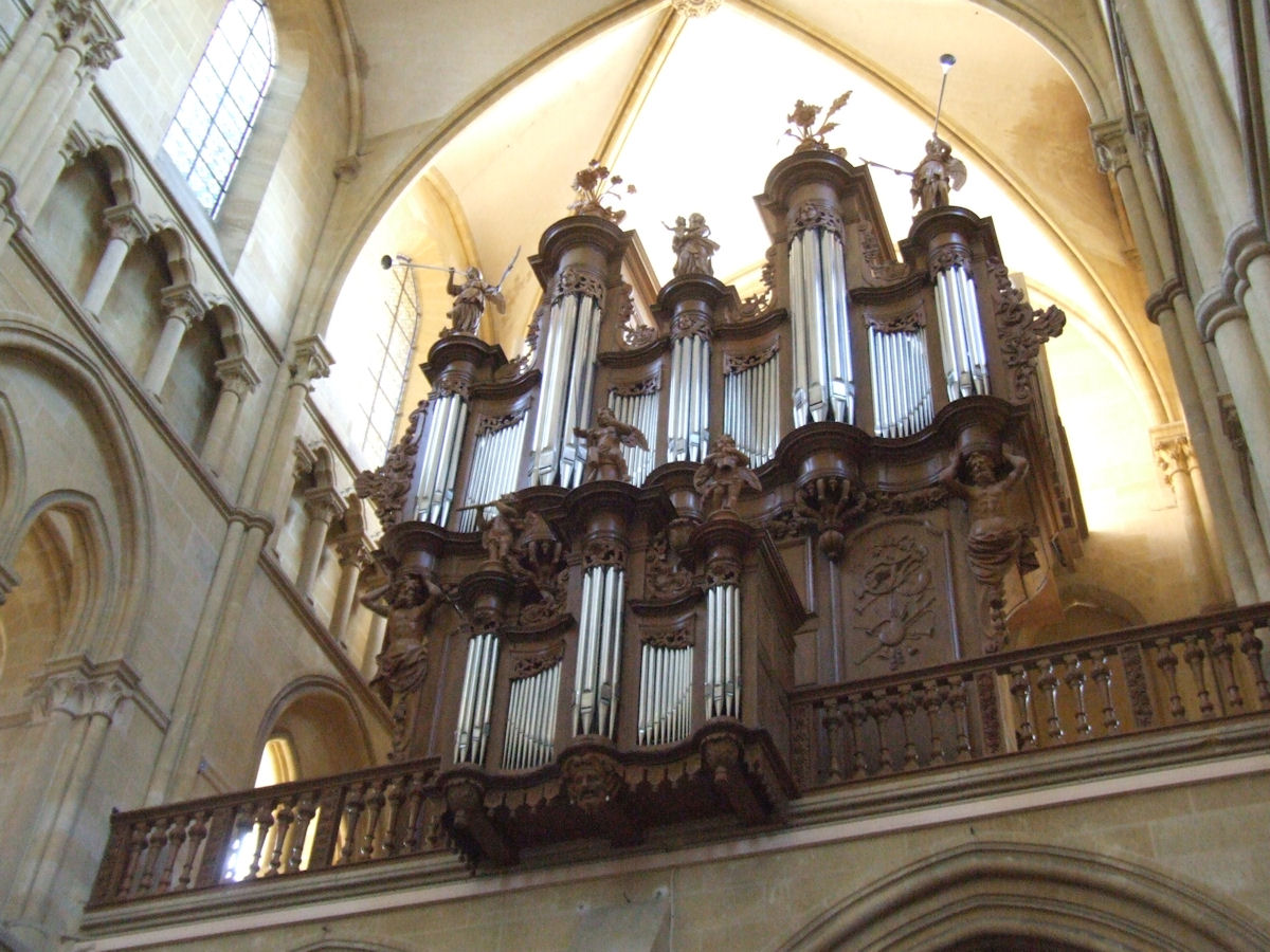 Eglise Notre-Dame de Mouzon, Mouzon, Ardennes, France